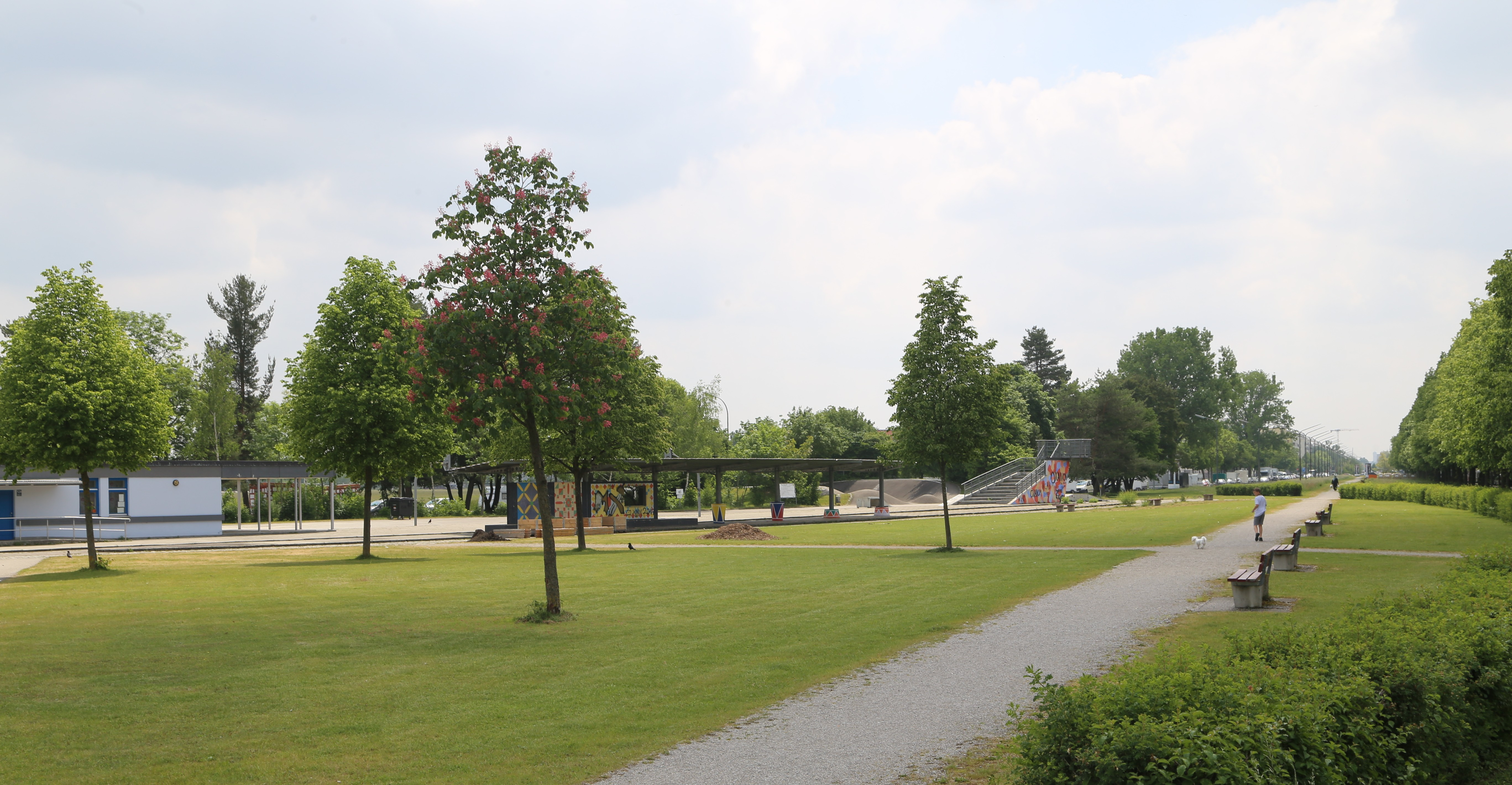 Goldschmiedplatz, Hasenbergl, München